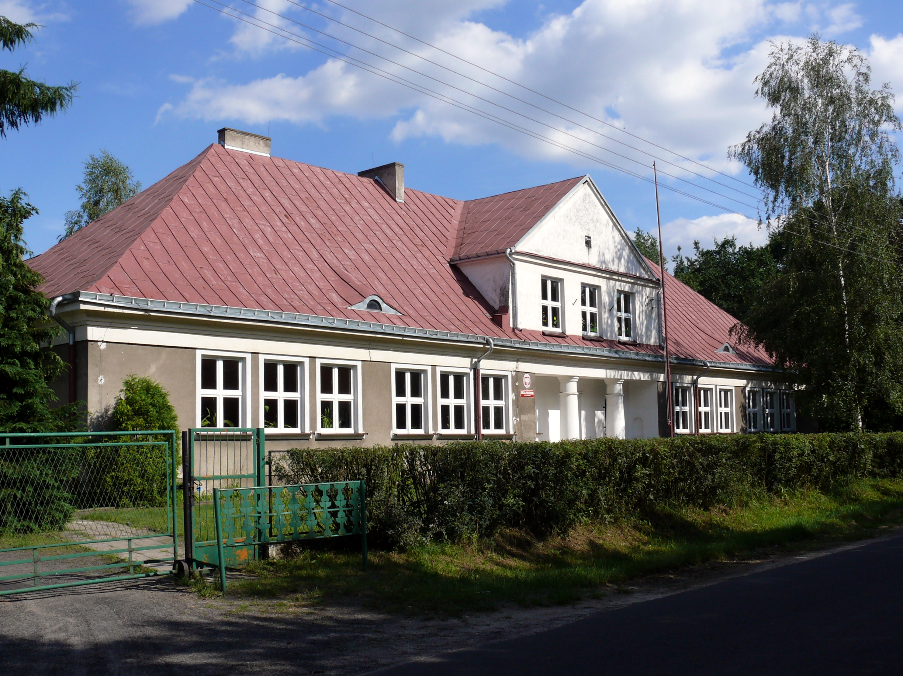 Gmach Szkoły Podstawowej w Ruszkowie Pierwszym